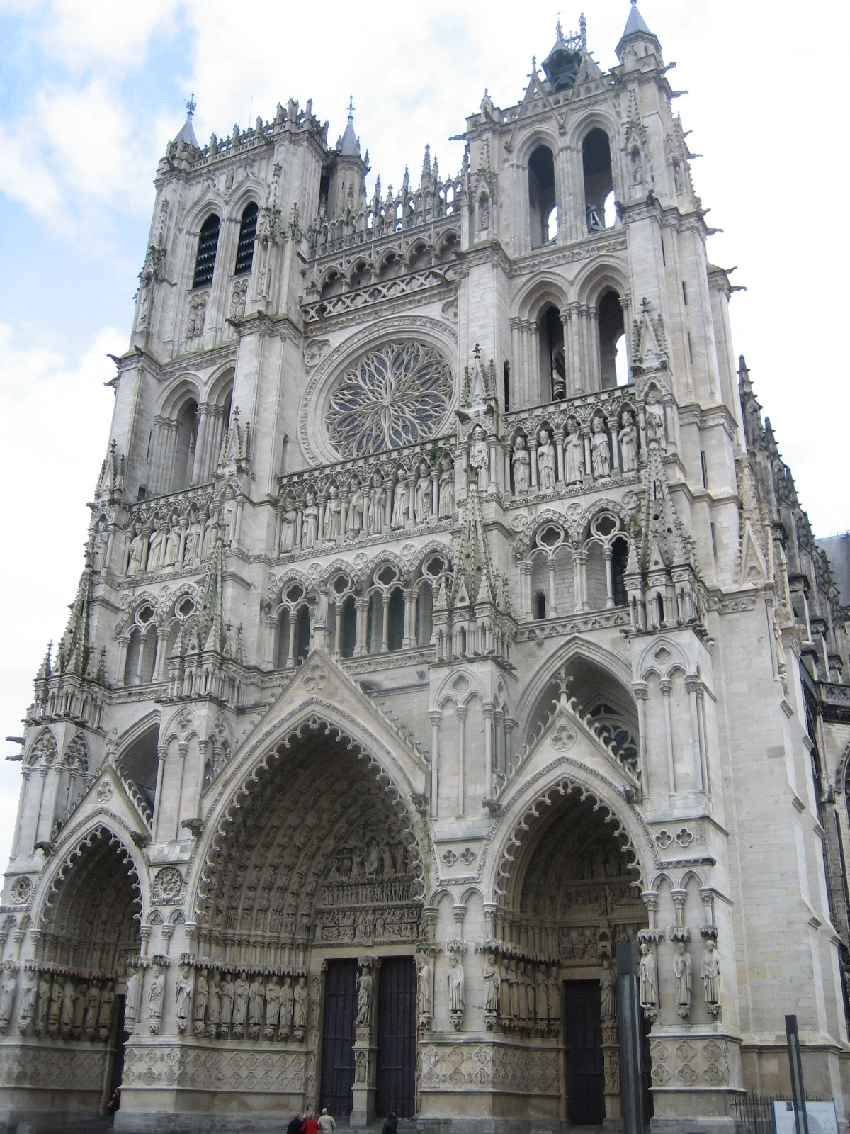 D'Kathedral Notre-Dame vun Amiens. 30. Abrëll 2006.